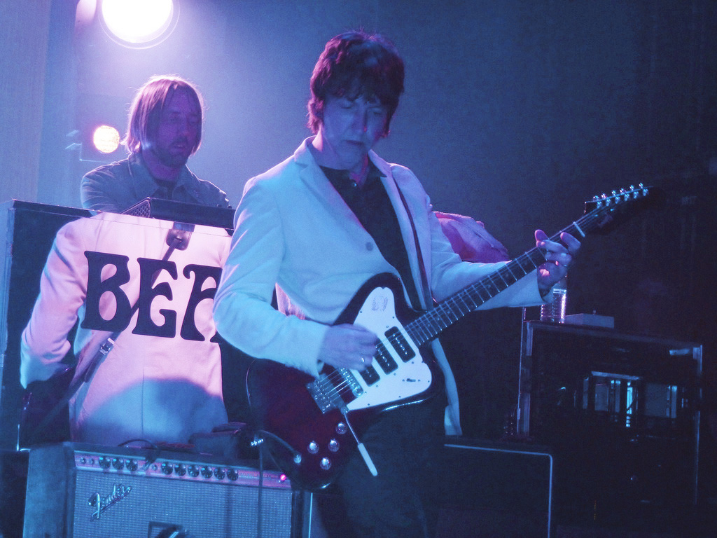 Beady Eye @ Ancienne Belgique